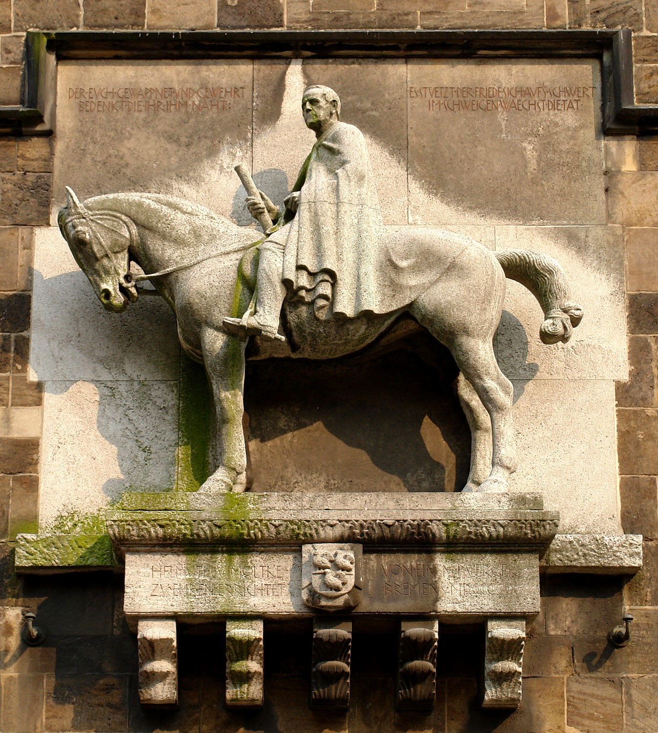 Denkmal in Muschelkalk für General-Feldmarschall Helmuth von Moltke an der Wand des Nordturms der Liebfrauenkirche. Herstellung: 1909. Entwurf: Heinrich Jennen, Rudolf Alexander Schroeder, Hermann Hahn. Bildhauer: Hermann Hahn. Inschrift von Rudolf Alexander Schroeder: "Der euch gewappnet und gewehrt, Bedenkt, die ihr ihm naht: Es stuetzt der Friede sich auf`s Schwert, im Schweigen waechst die Tat." Stifter: Bankier Bernhard Loose Das abgebildete Objekt ist ein geschütztes Kulturdenkmal in der Freien Hansestadt Bremen, mit der Nr. 1180,T001 beim Landesamt für Denkmalpflege registriert.